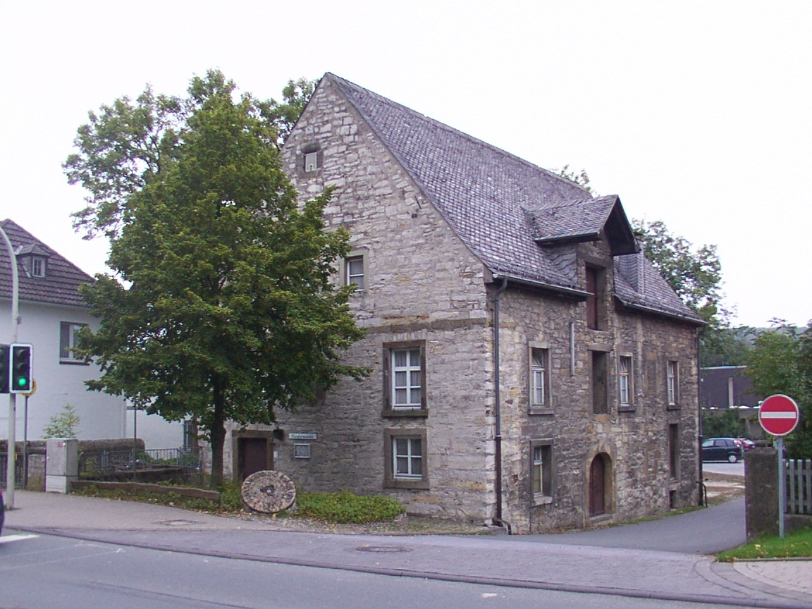 Büren (Westfalen): Niedermühle, eine 1537 erbaute denkmalgeschützte Wassermühle